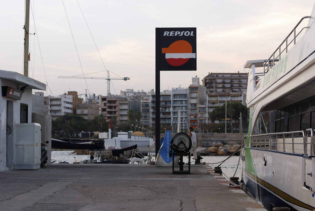 Repsol bunkerage point in Blanes, Catalunya